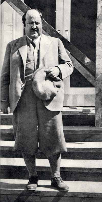 Ludvig Nordström